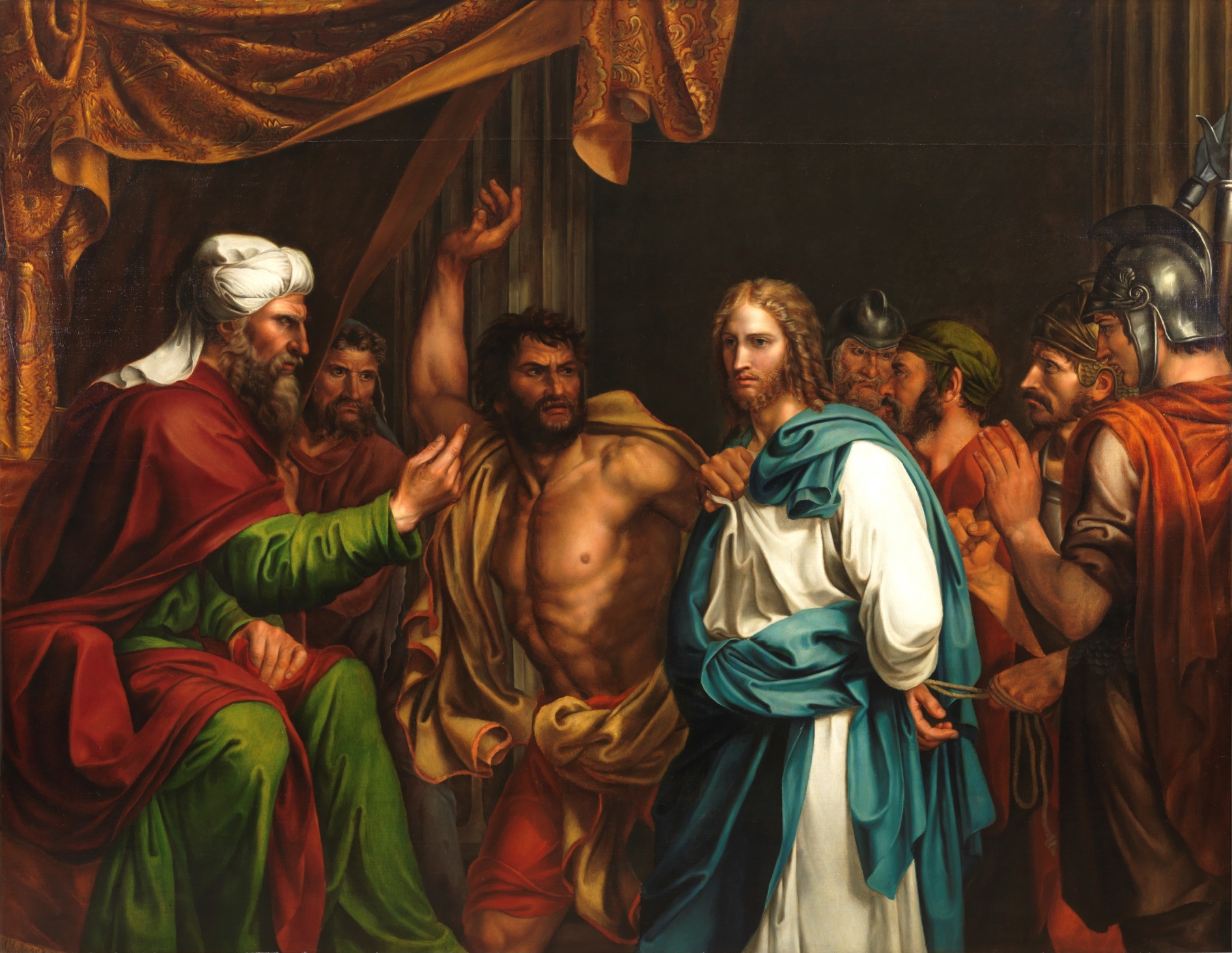 El lienzo muestra a Jesucristo en el momento en que compareció ante el sumo sacerdote Anás en la casa de este último.